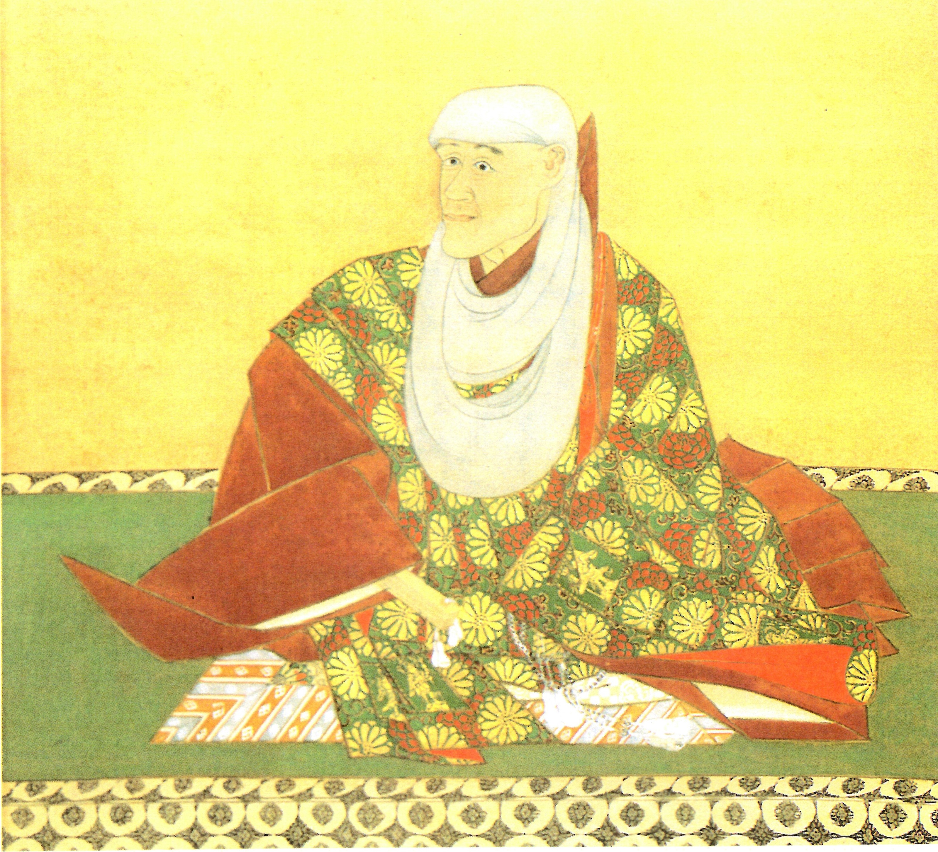 守澄法親王の肖像。